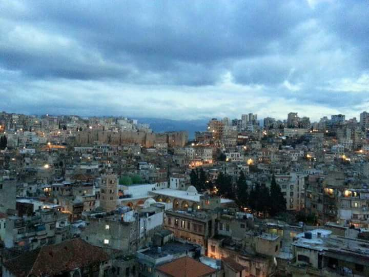 مدينة طرابلس